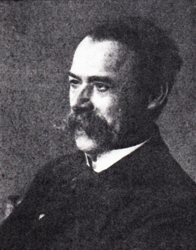 Porträt von Wilhelm Woernle, Kopie einer historischen Fotografie um 1900